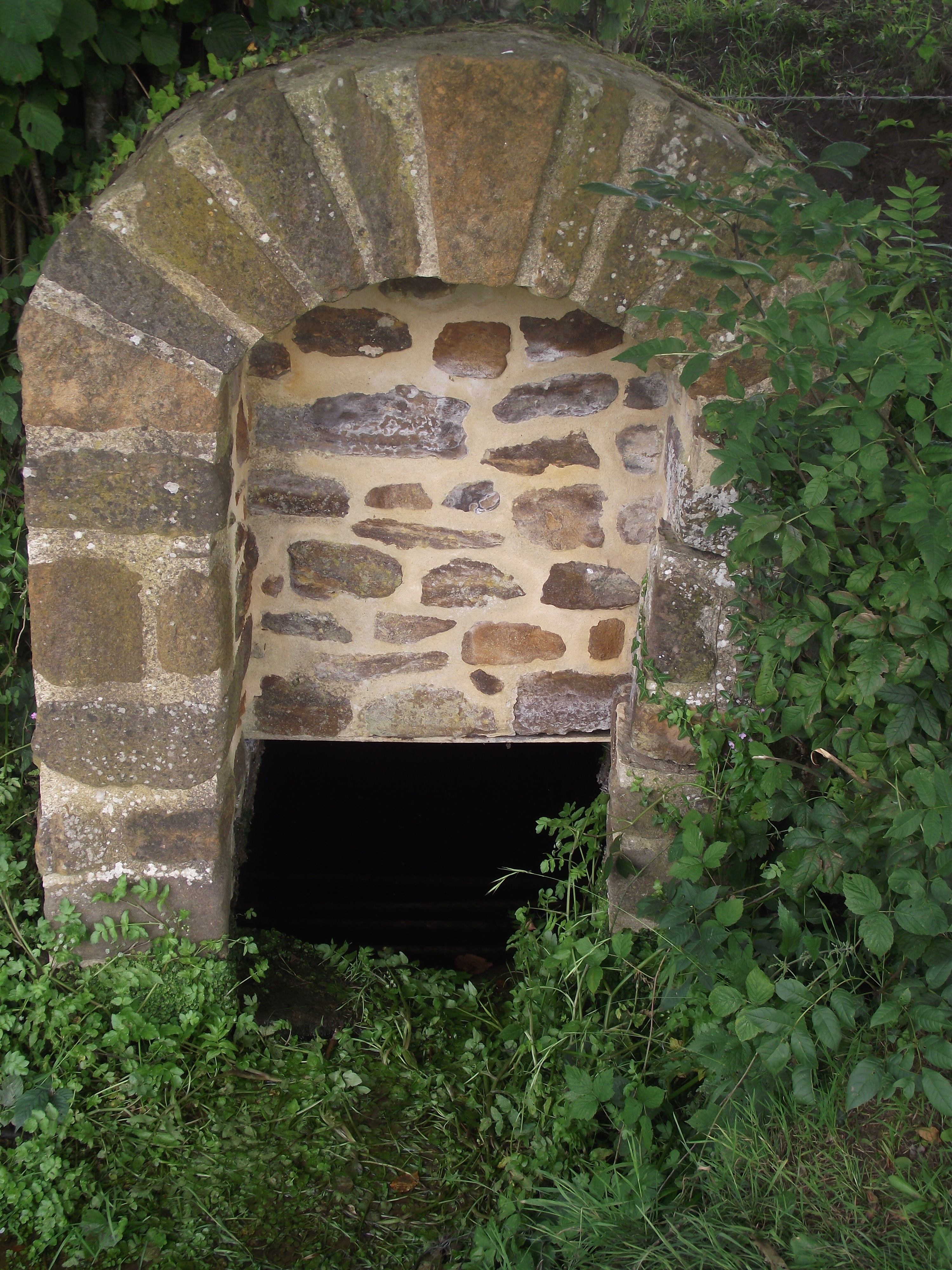 La source de la Sarthe dans le département de l'Orne